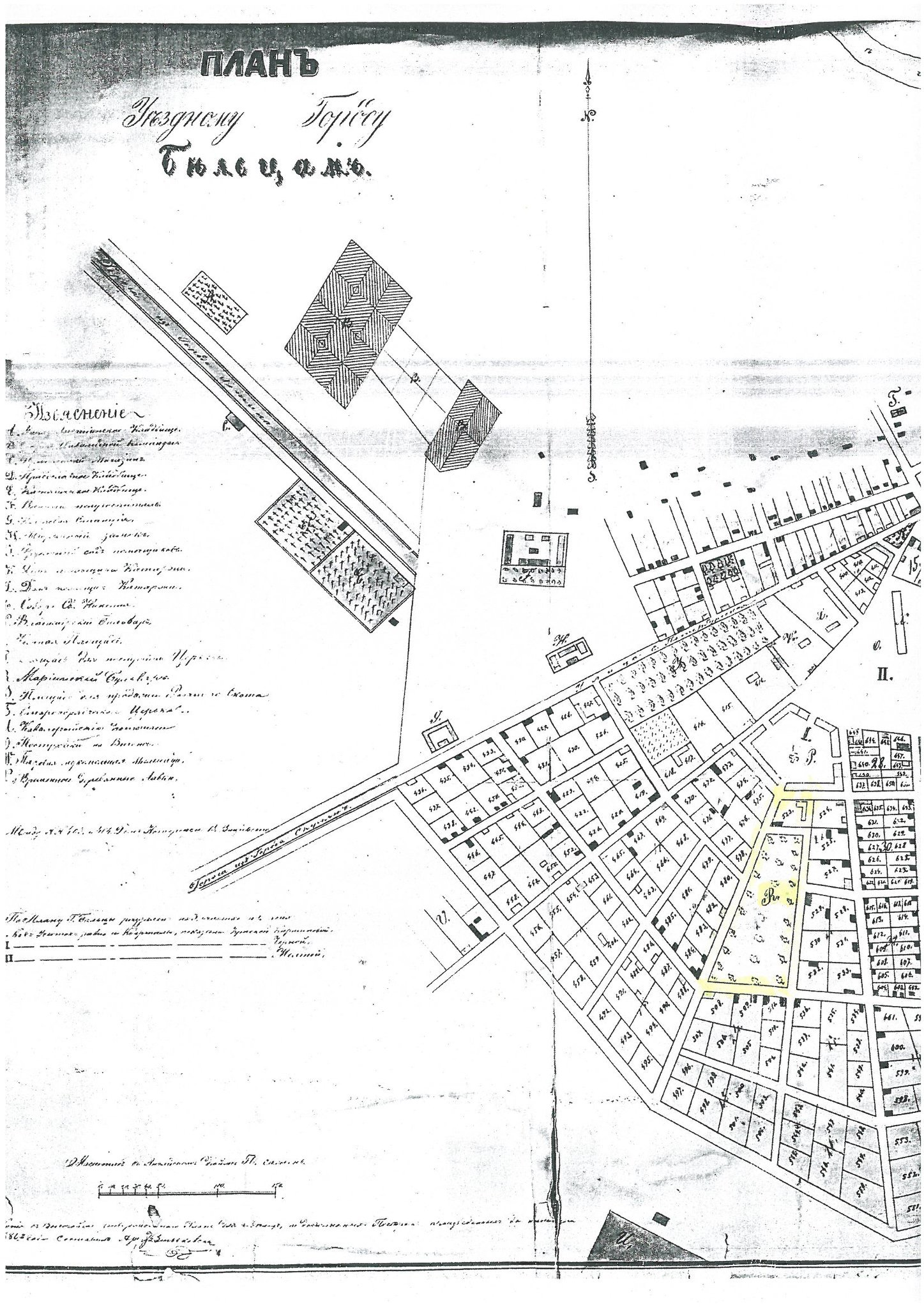 Первый генплан Бельц - Мариинский парк